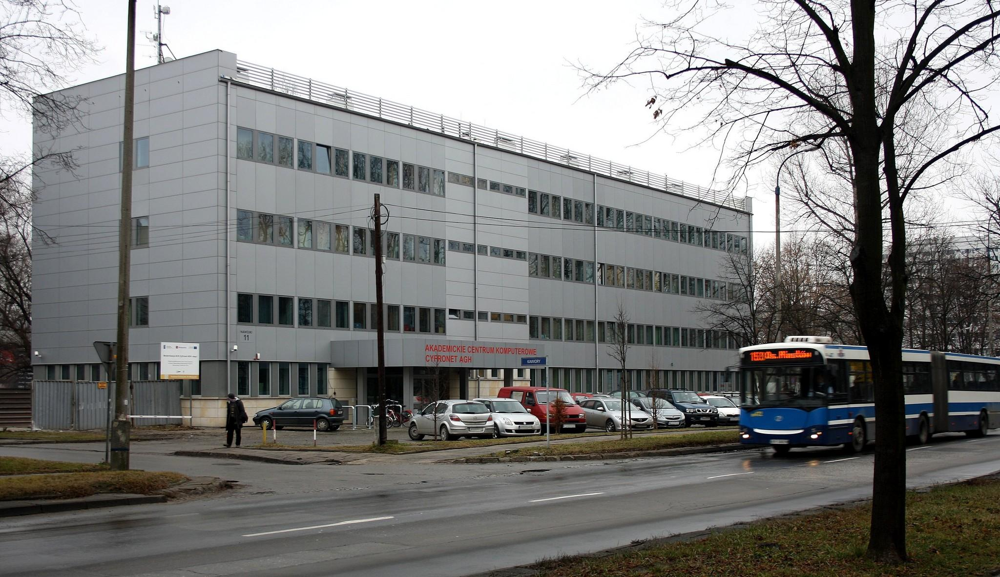 Akademickie Centrum Komputerowe Cyfronet AGH w Krakowie przy ulicy Nawojki (grudzień 2011).